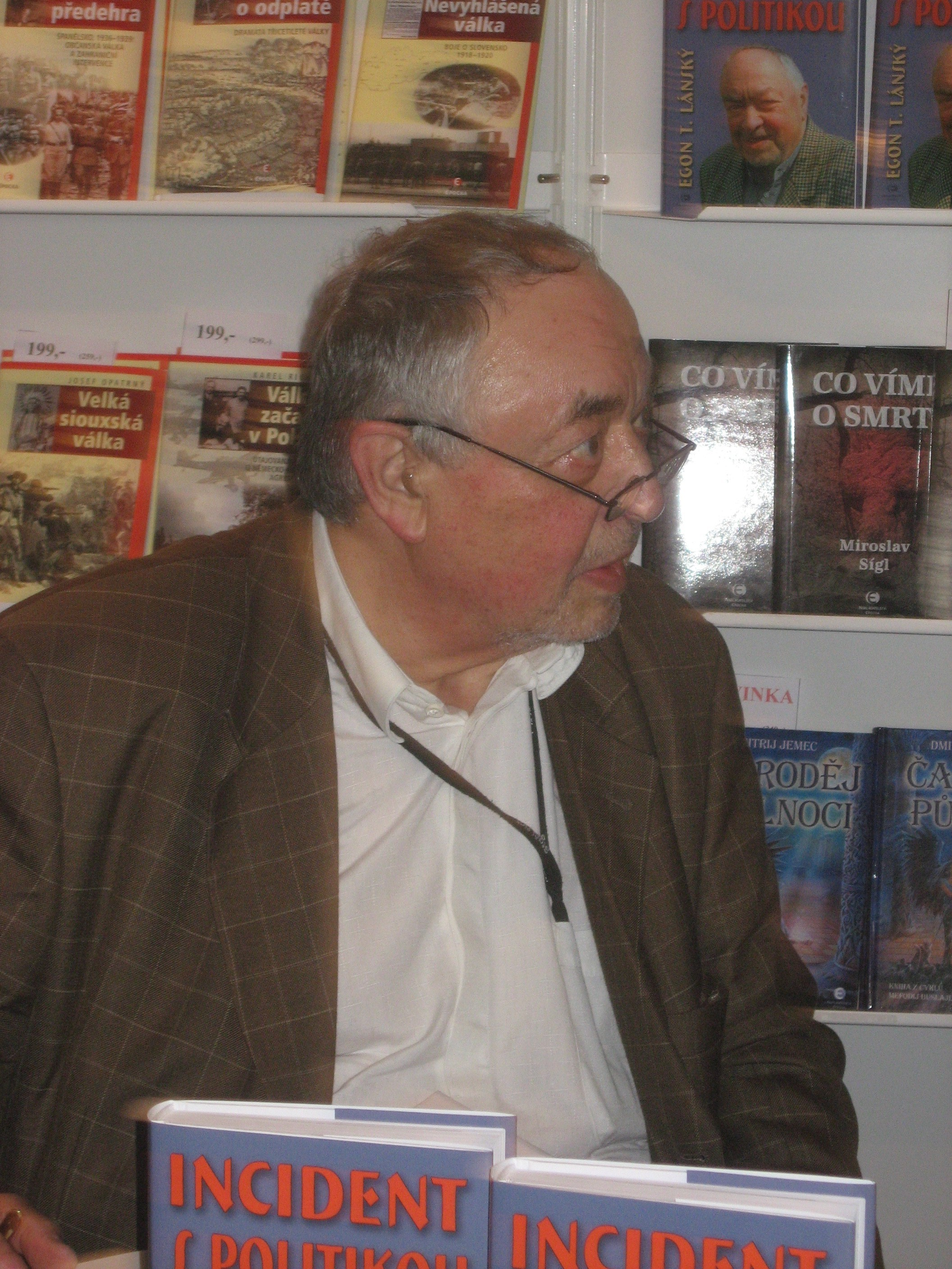 Egon Lánský